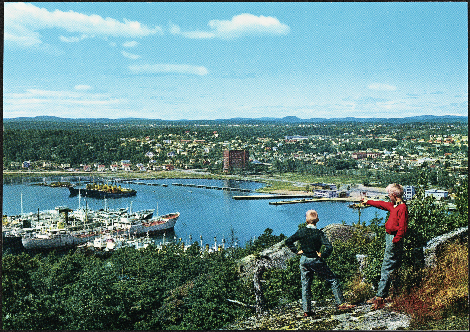 Tittel / Title: Norge: Sandefjord Motiv / Motif: Postkort. C-E-3 (produksjonsnummer fra Normann) Dato / Date: ca 1970 Fotograf / Photographer: Normann Utgiver / Publisher: Normanns kunstforlag AS Sted / Place: Vestfold, Sandefjord Eier / Owner Institution: Nasjonalbiblioteket / National Library of Norway Lenke / Link: Bildesignatur / Image Number: blds_04707